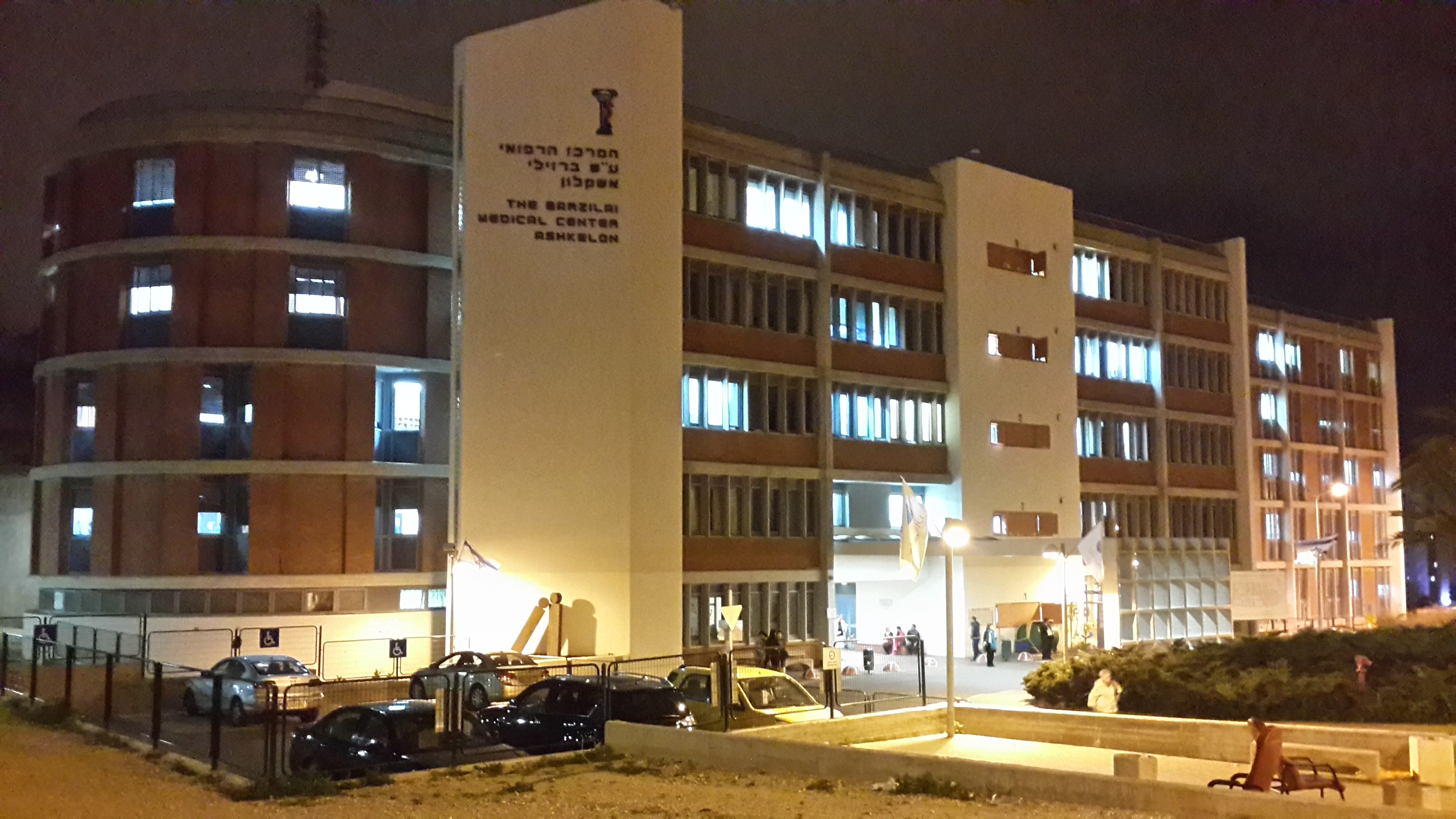 Больница Барзилай ночью.